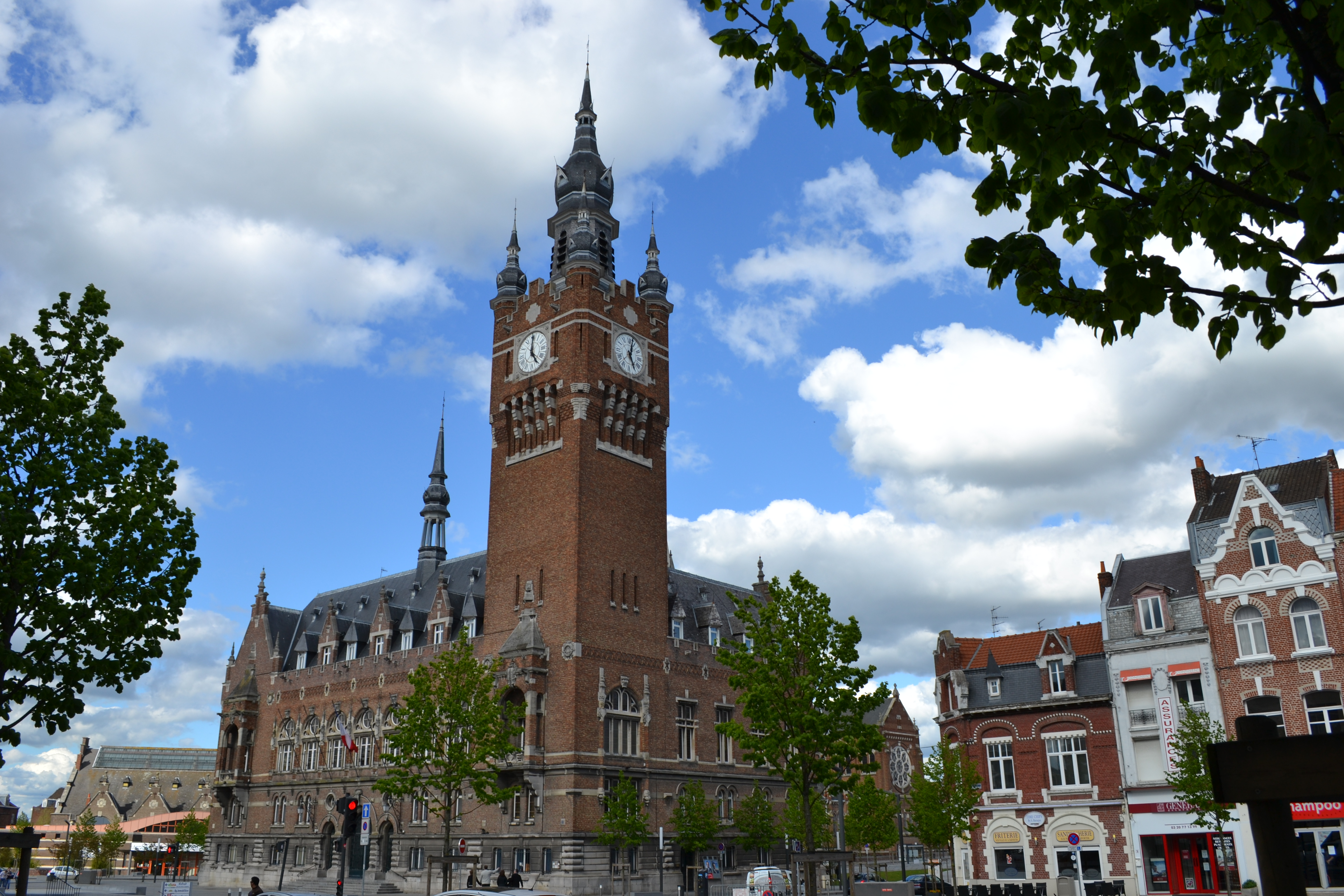 Mairie d'Armentières